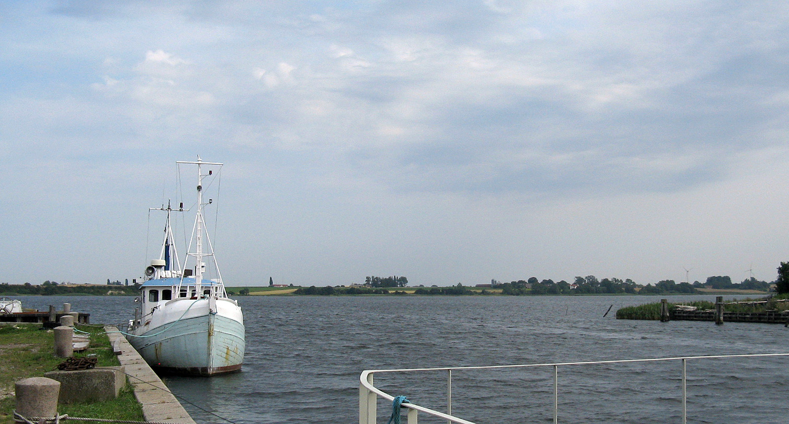 Stege Nor på Møn, set fra Stege.